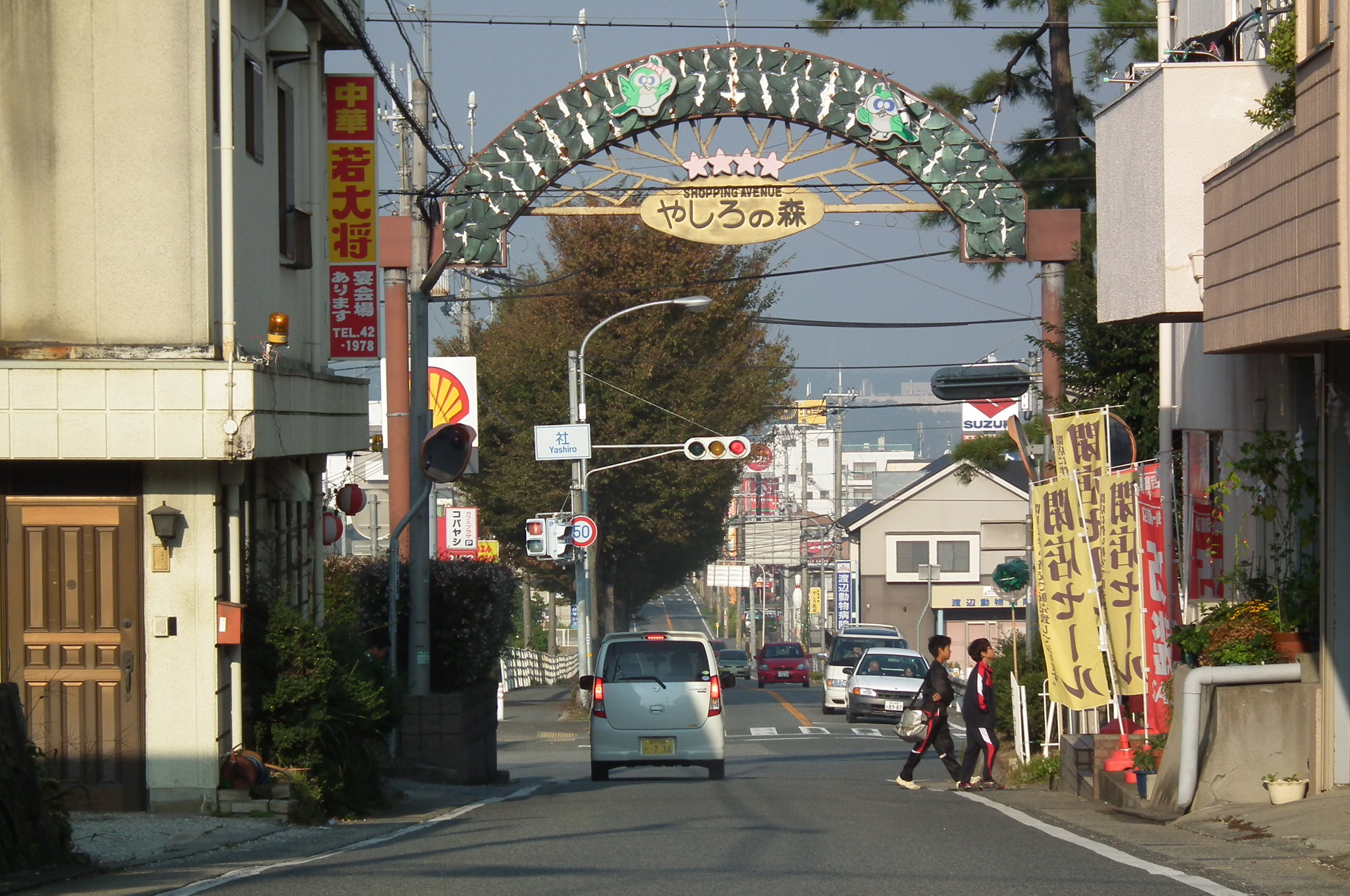 Yashiro Katō, Hyōgo 兵庫県加東市社町